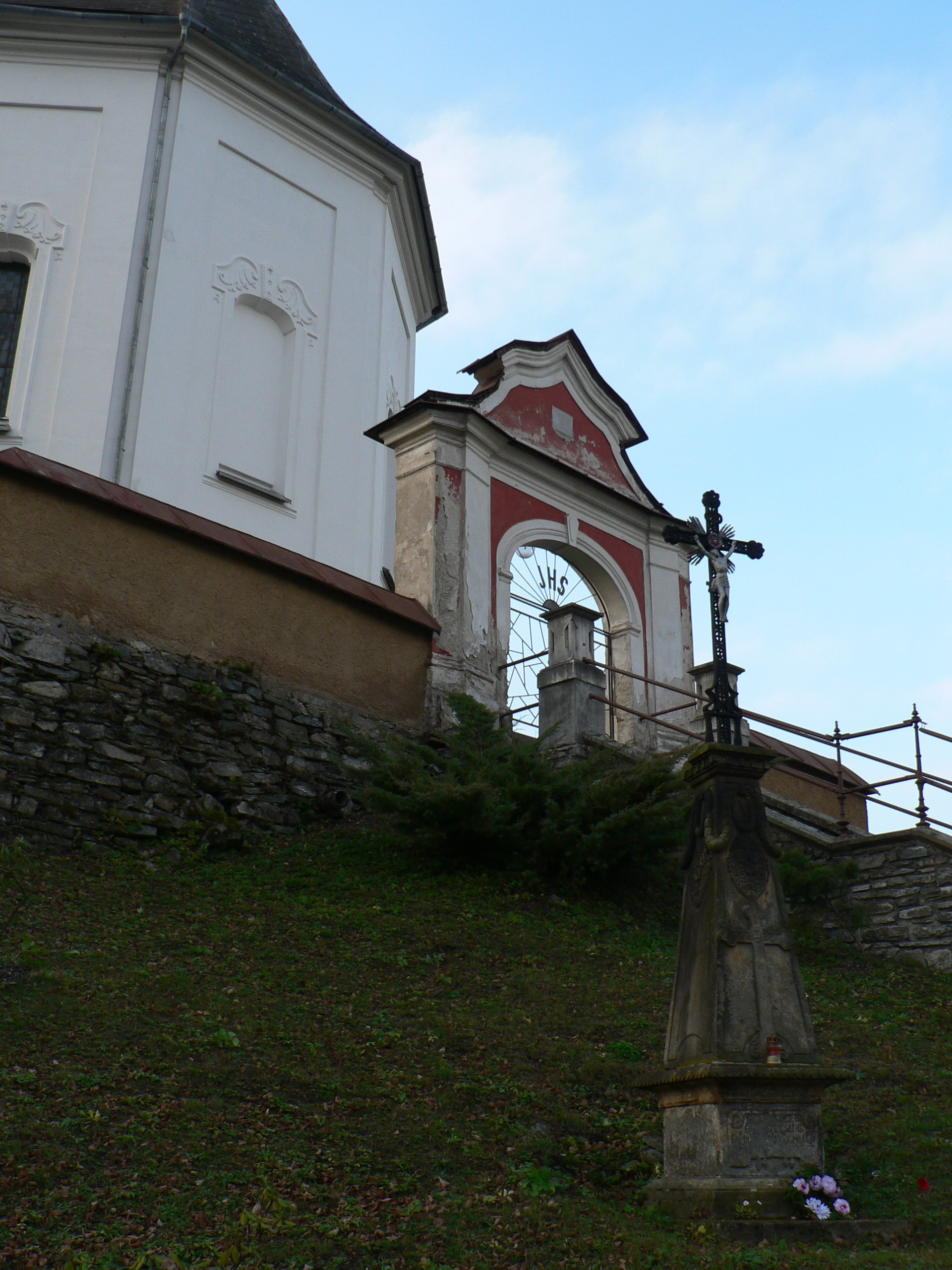 Kostel Nejsvětější Trojice (Kopřivná)